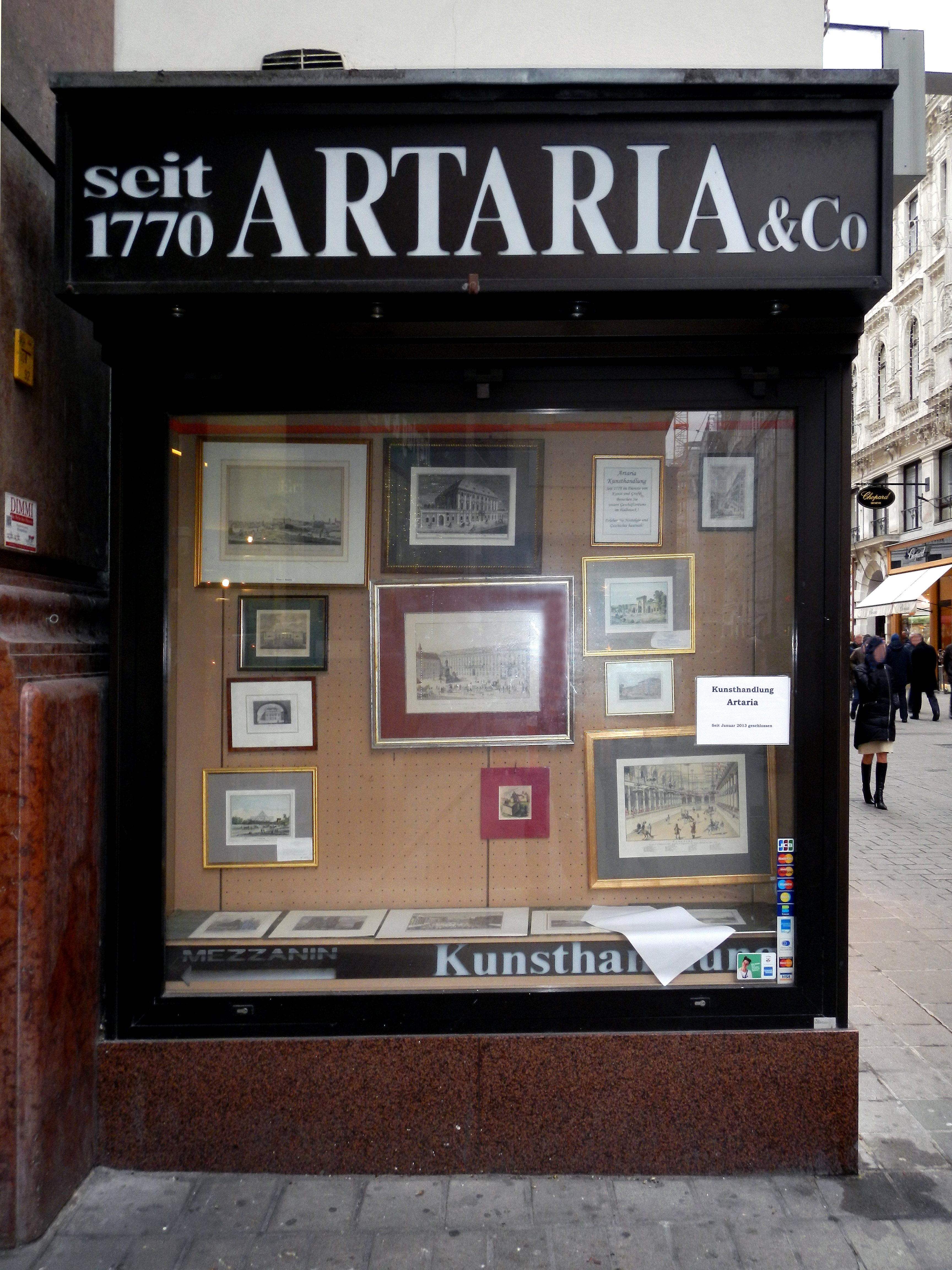 Schaufenster der bis 2012 existierenden Kunsthandlung Artaria & Co. im Artaria Haus am Kohlmarkt in Wien